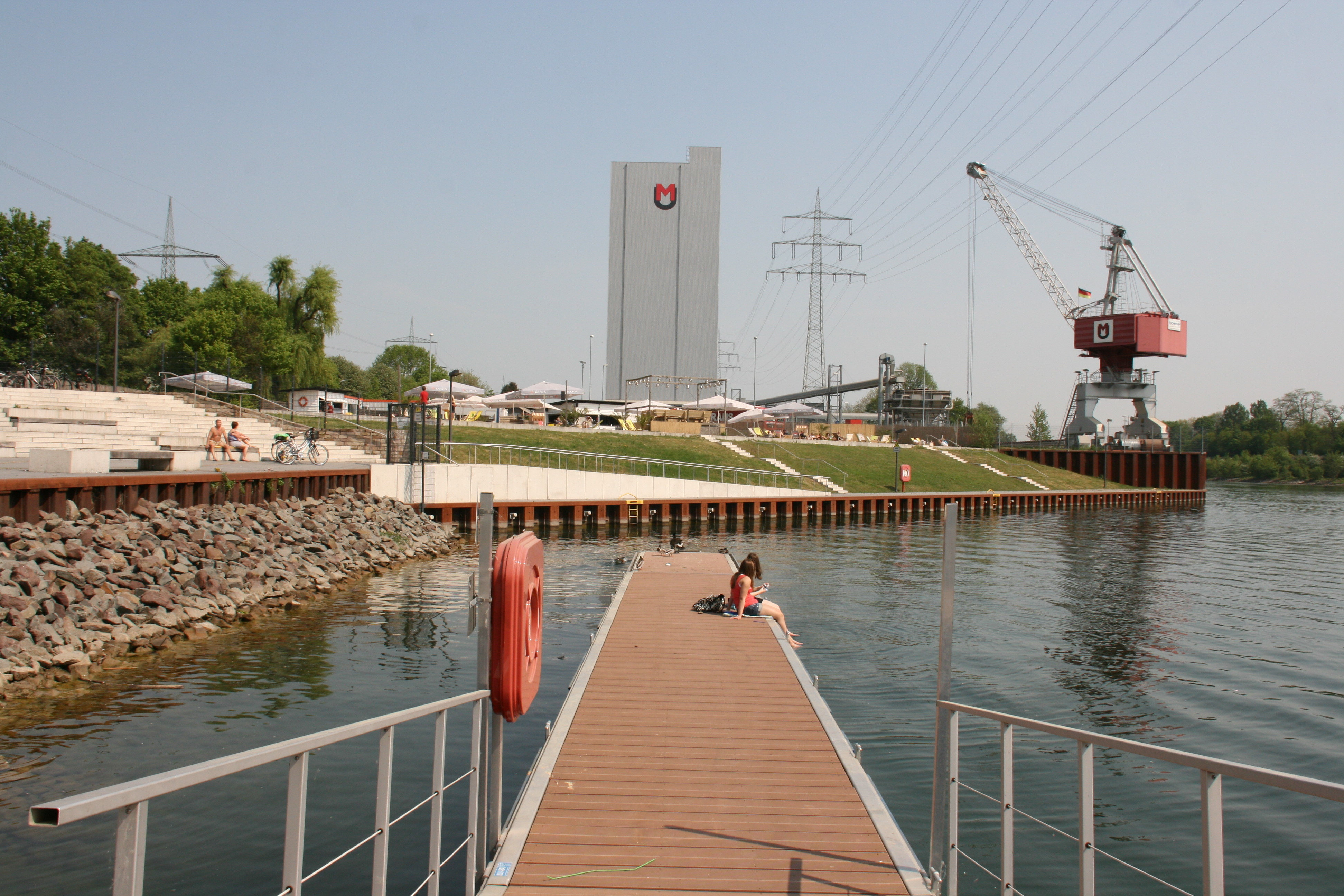 Stadthafen, Am Stadthafen in Recklinghausen